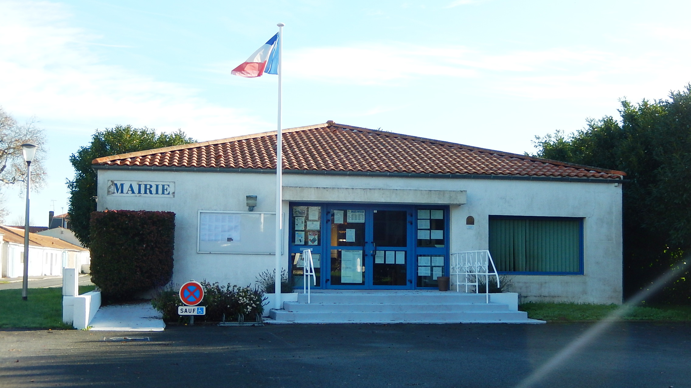 La mairie d'Yves, située dans le village du Marouillet. (Charente-Maritime, France)